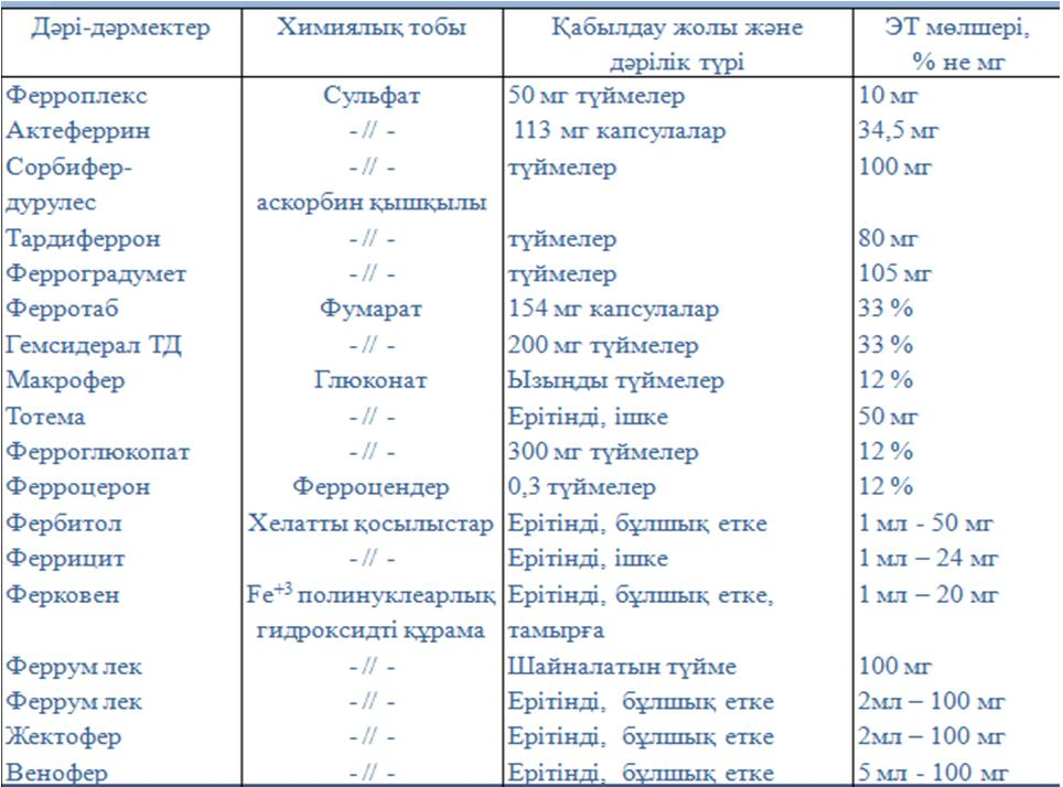 Кең таралған темір дәрілерінің негізгі сипаттамалары